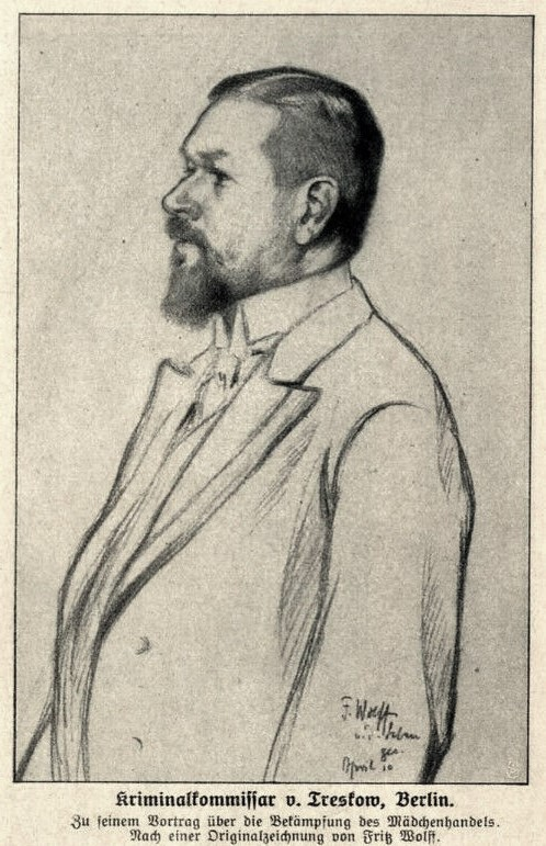 Kriminalkommissar Hans von Tresckow, Berlin, April 1910